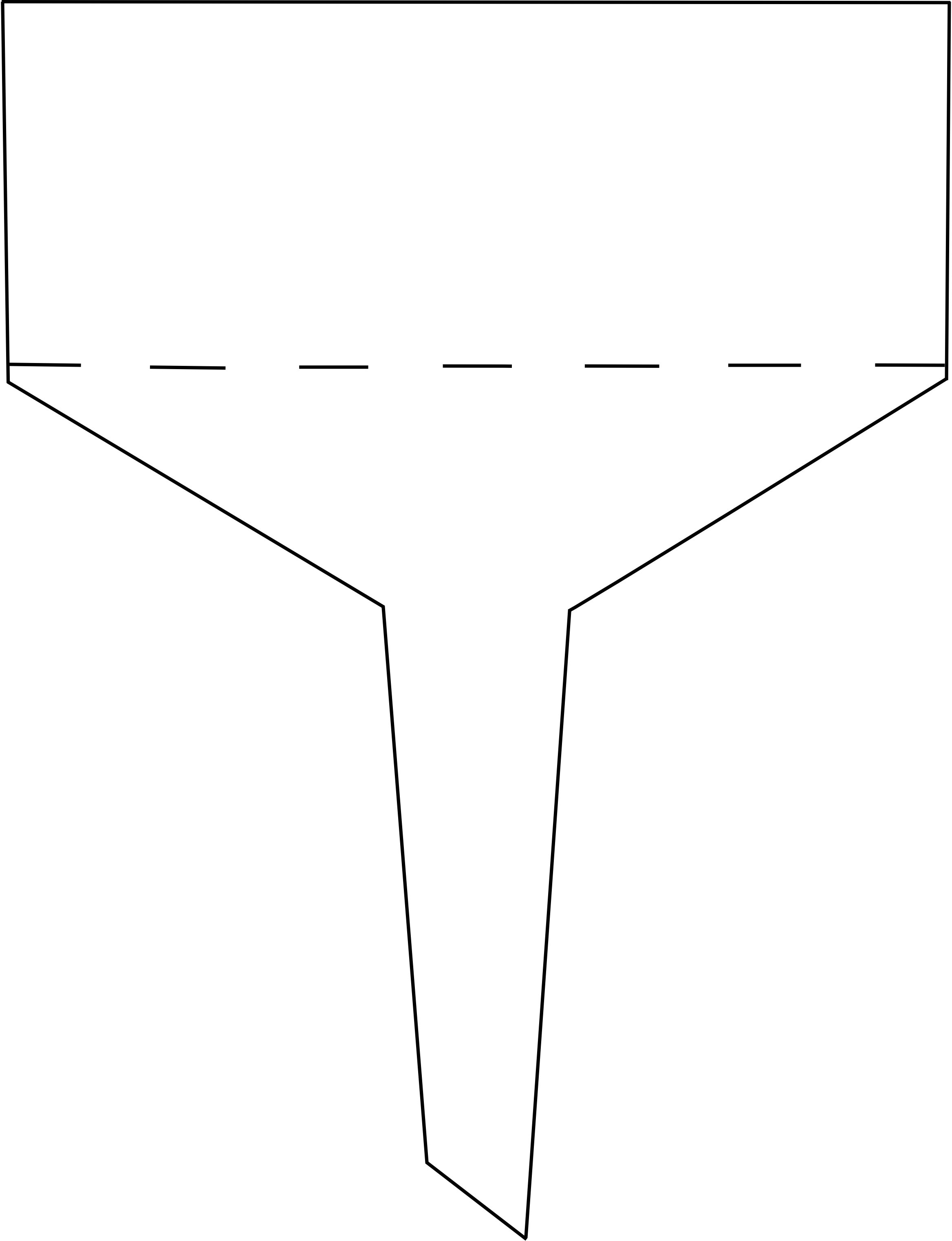 selbst gezeichnet mit Inkscape - SVG von Talos 6. Jul 2005 17:56 (CEST)